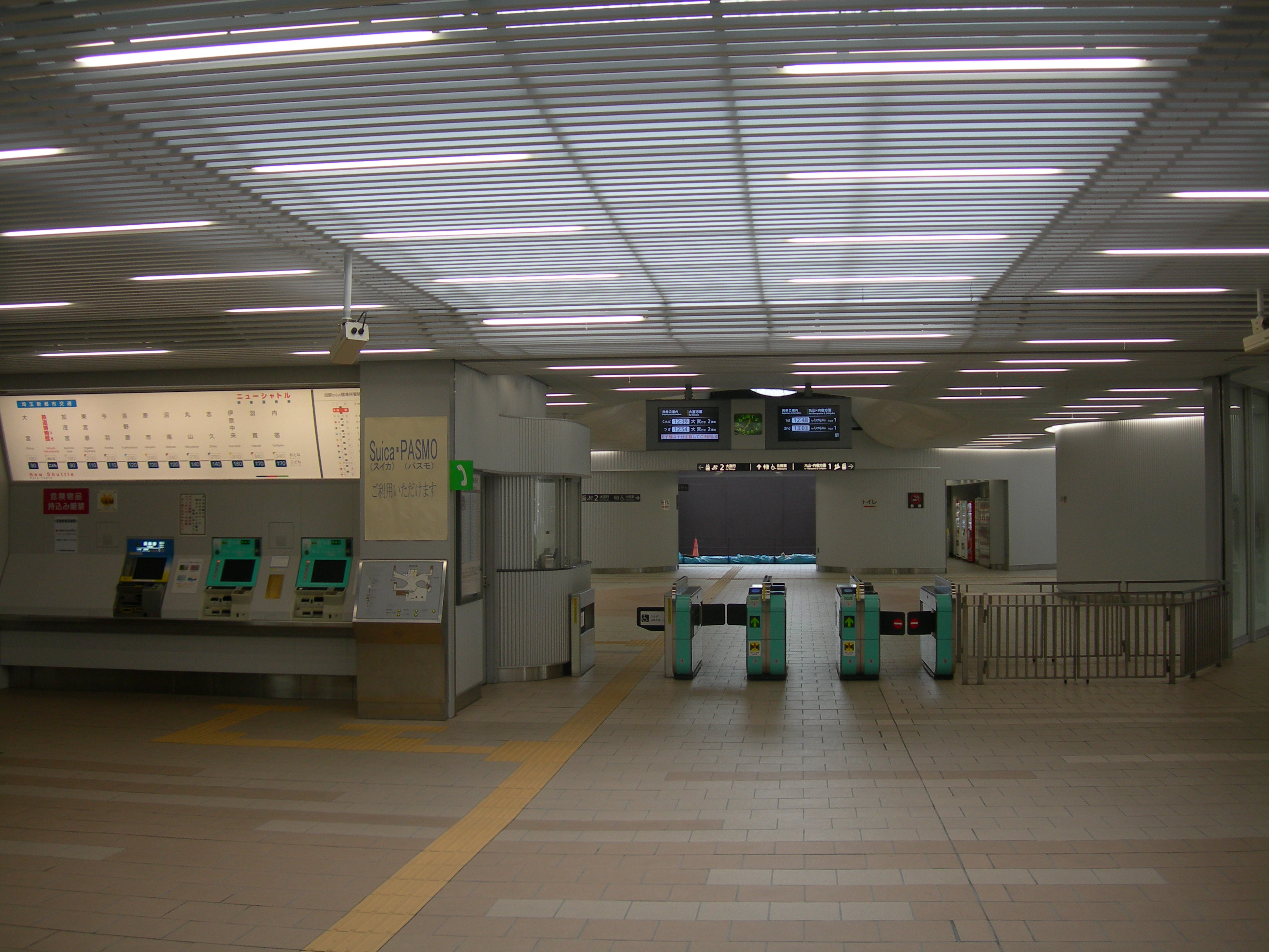 鉄道博物館駅改札口